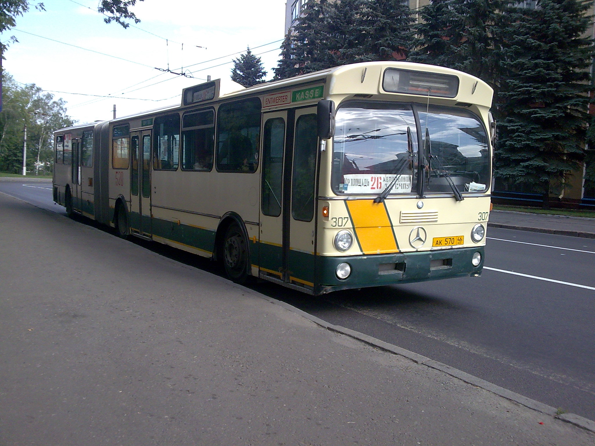 Автобус Mercedes-Benz O 305 G в Курске.